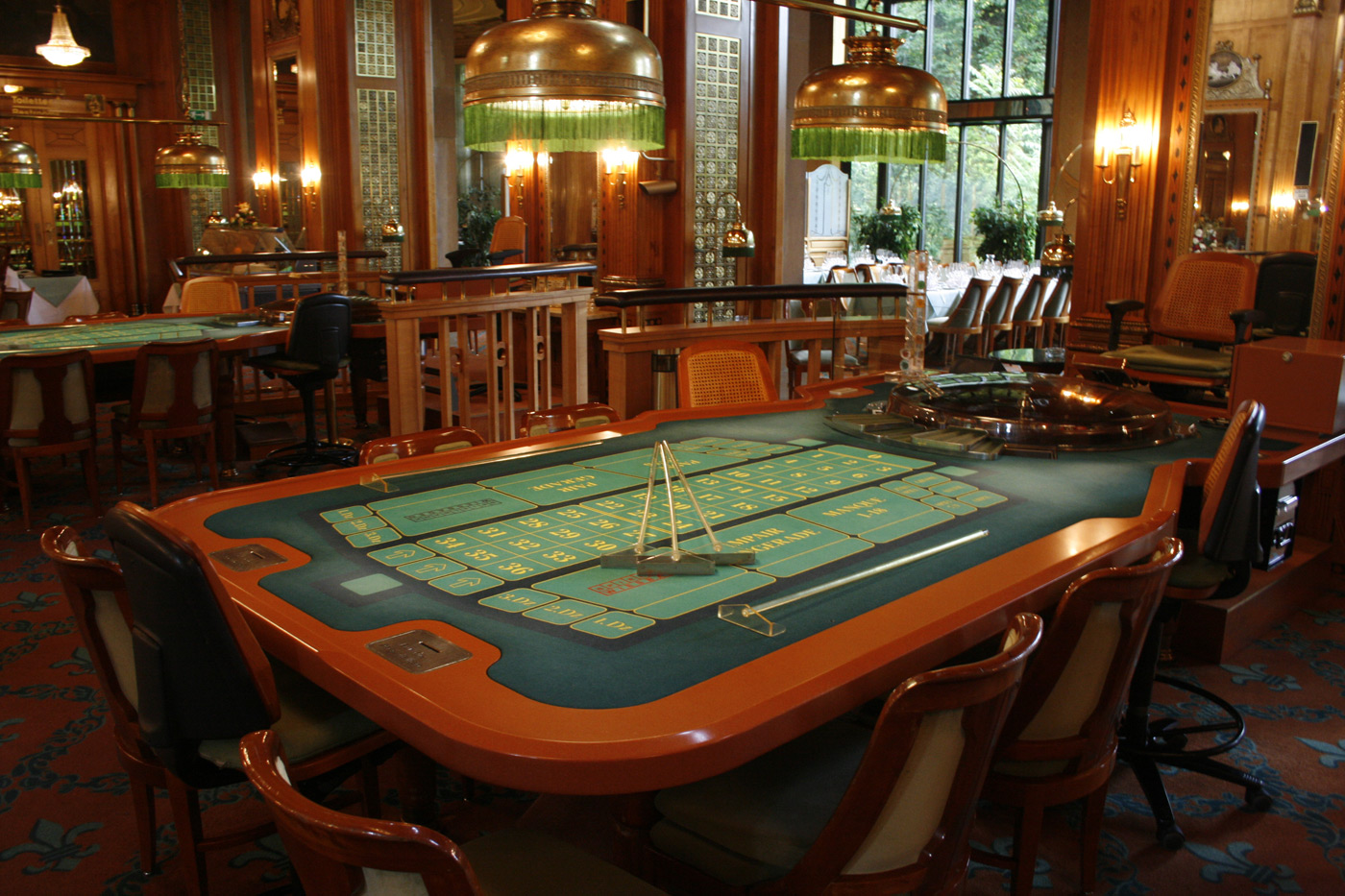 Roulette-Tisch in der Spielbank Wiesbaden